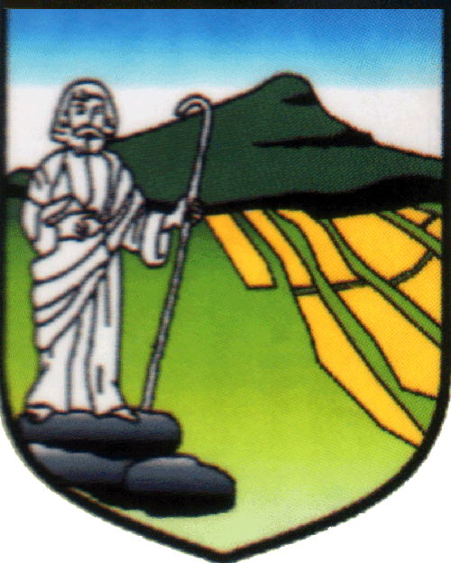 Herb gminy Pielgrzymka (powiat złotoryjski)